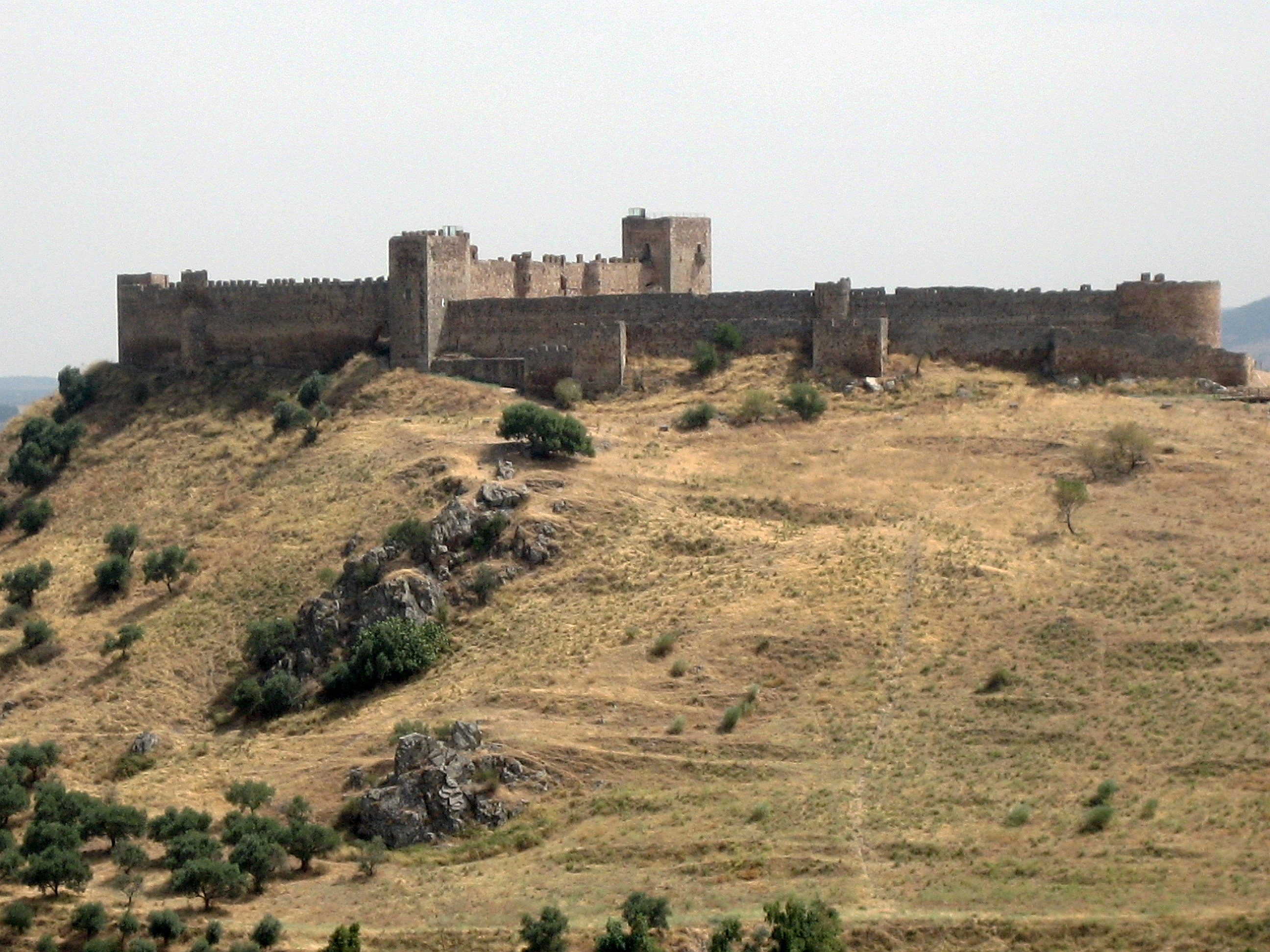 Foto tomada desde un restaurante situado en un monte opuesto en la sierra de Enfrente.